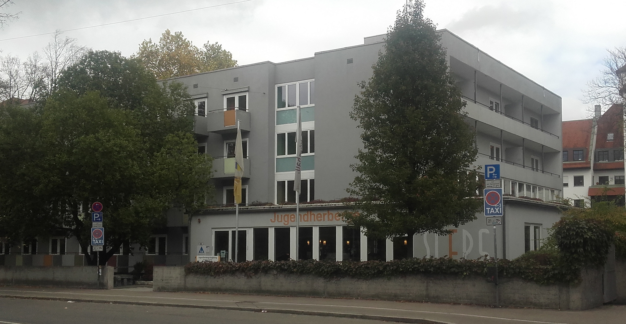 Blick auf die Jugendherberge in Augsburg (ehem. Schwesternwohnheim beim Alten Hauptkrankenhaus)